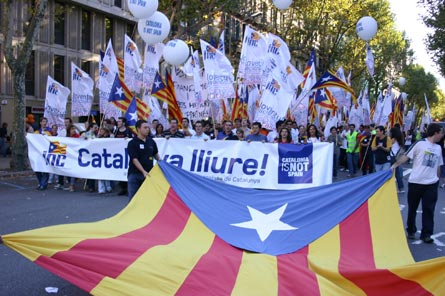 Manifestació de la Joventut Nacionalista de Catalunya (JNC) a Barcelona per l'Onze de Setembre